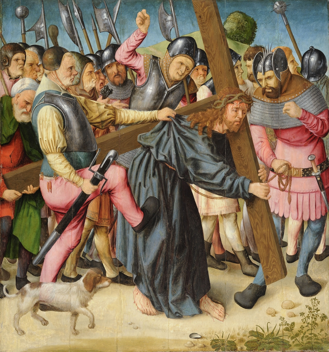 Peinture